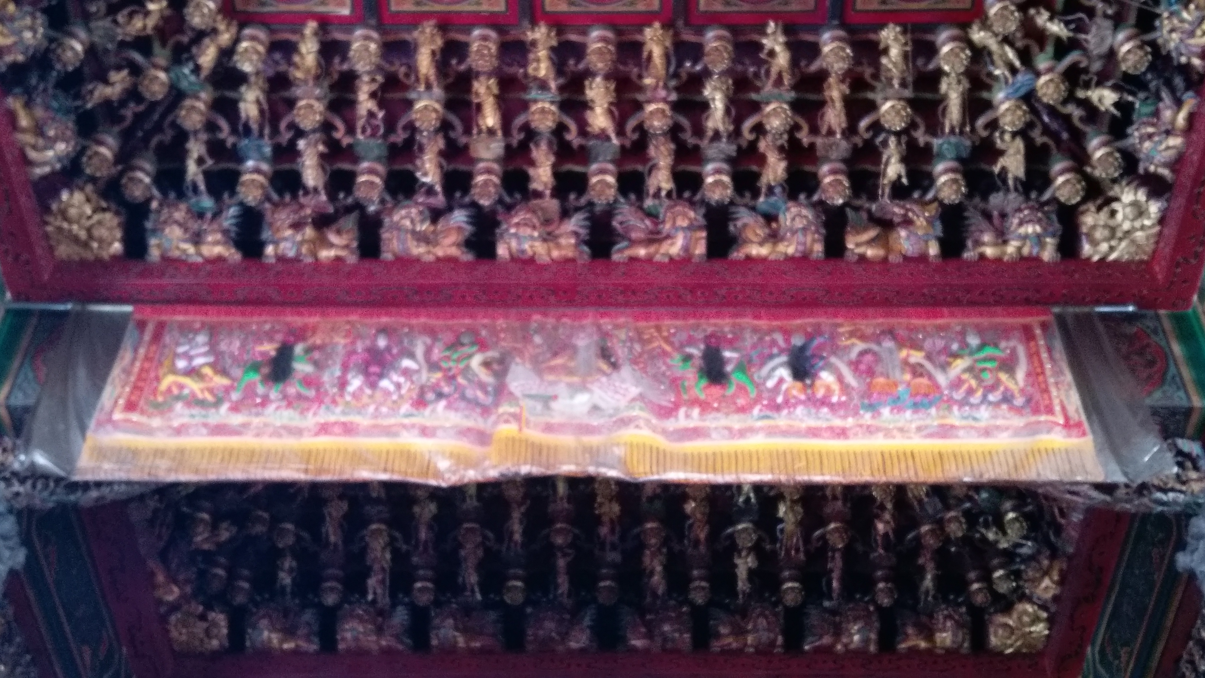 中文（台灣）: 廟宇懸掛的八仙綵